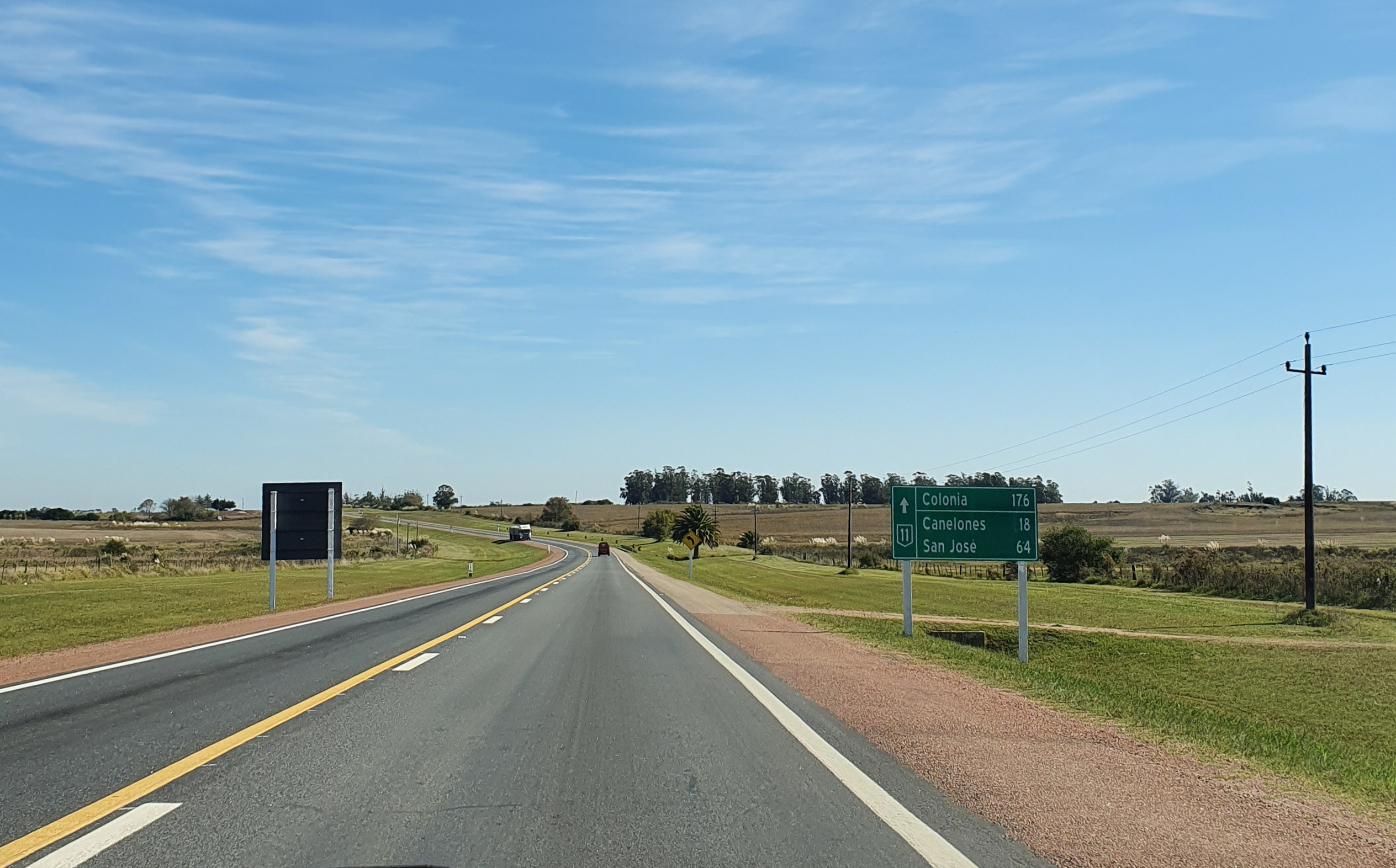 Ruta 11 km 116, departamento de Canelones, Uruguay. Próximo a su cruce con la ruta 33.